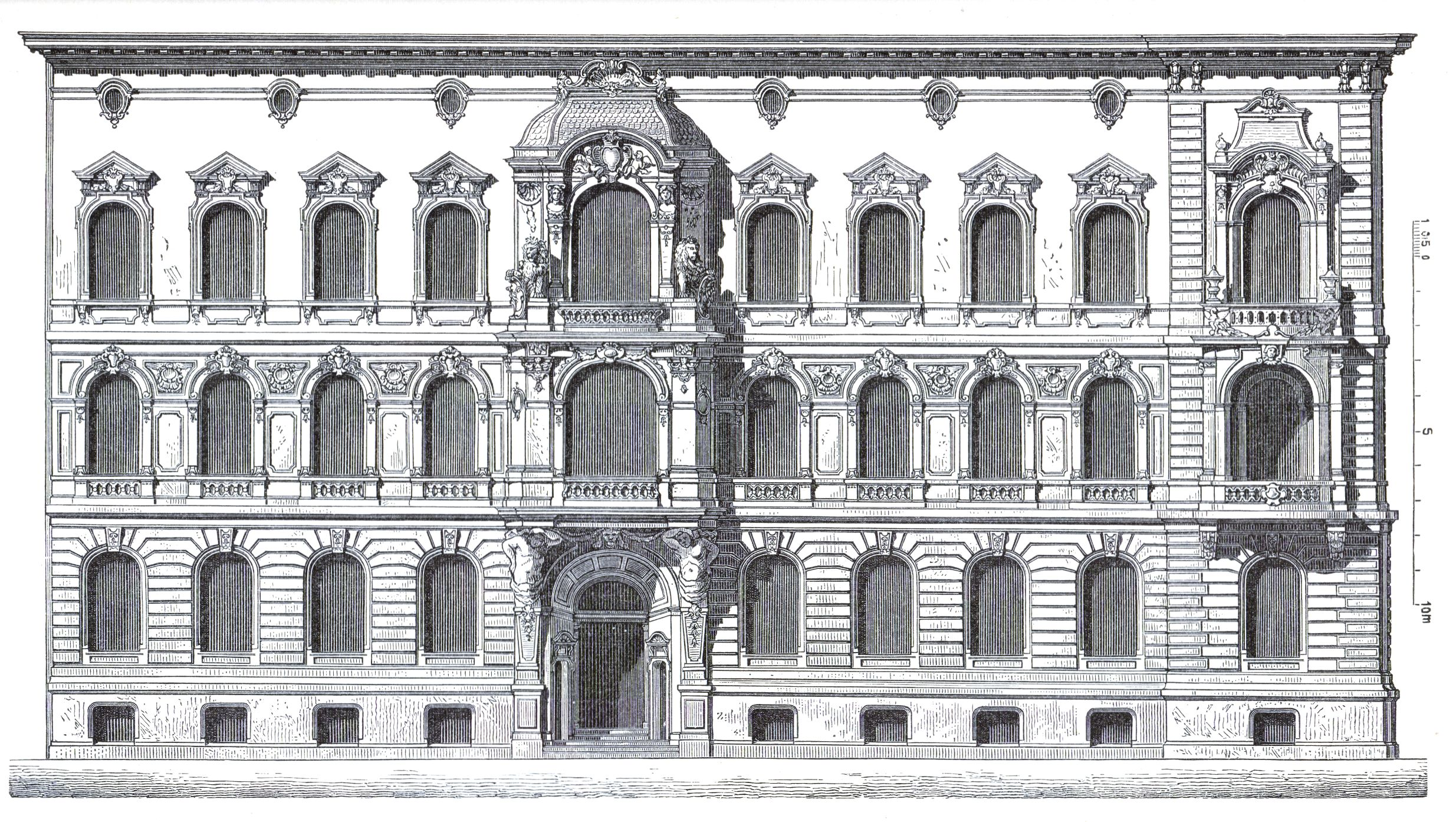 Fassade eines Wohn- und Geschäftshauses in Berlin, Behrenstraße / Wilhelmstraße, erbaut 1886/1887 von Cremer & Wolffenstein